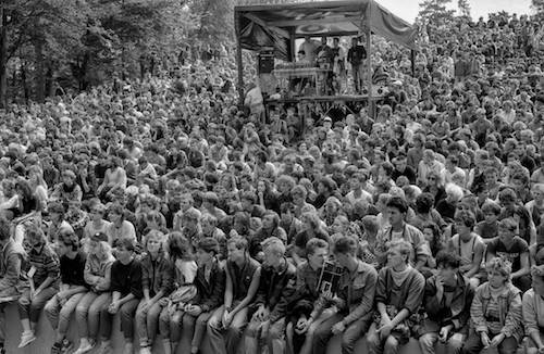 Publiczność na małej scenie Festiwalu w Jarocinie. 1988